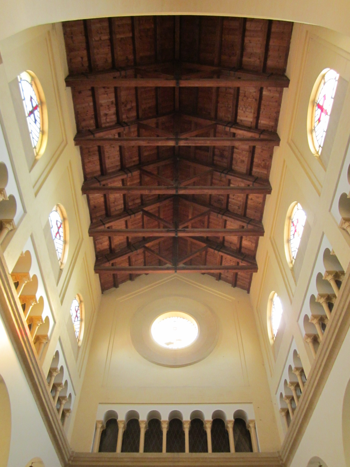 Interno chiesa